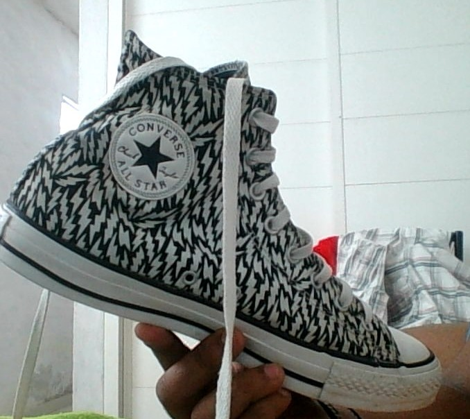 Converse de Edición Limitada, con un diseño de rayos.